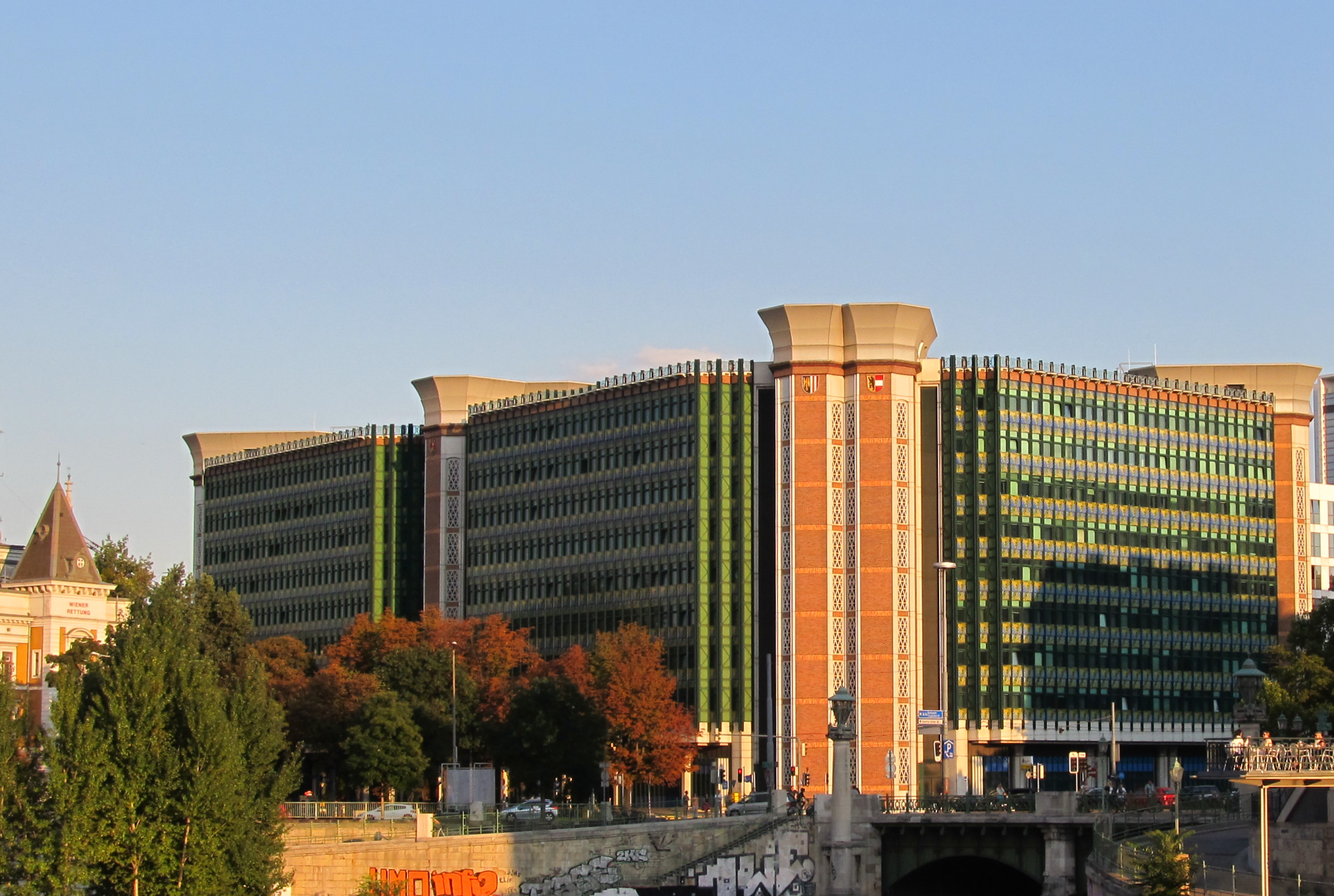 Das „Oktoneum“ (sogenannt auf Grund der achteckigen Form) beherbergt das Bundesministerium für Gesundheit sowie das Bundesministerium für Verkehr, Innovation und Technologie.